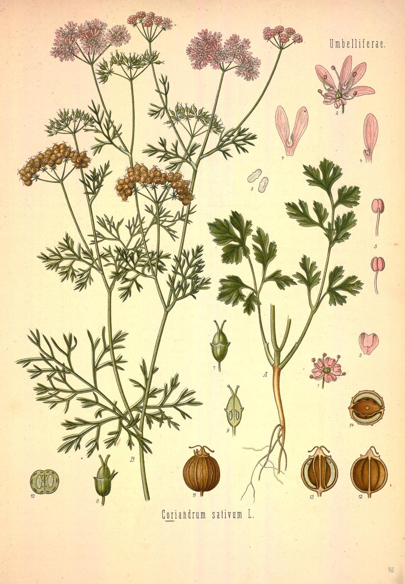 Echter Koriander. A B Pflanze in natürl. Grösse; 1 Scheibenblüthe, vergrössert; 2 Randblüthe, desgl.; 3 Kronblatt der Scheibenblüthe, desgl.; 4 Kronenblätter der Randblüthe, mittleres und seitliches, desgl.; 5 Staubgefäss, desgl.; 6 Pollen; desgl.; 7 u. 8 Fruchtknoten mit Kelch, desgl.; 9 dieselbe Figur im Längsschnitt; 10 Fruchtknoten im Querschnitt, desgl.; 11 Frucht, desgl.; 12 Theilfrüchtchen, von der Fugenseite, desgl.; 13 Frucht im Längsschnitt, desgl.; 14 dieselbe im Querschnitt, desgl. Köhler's Medizinal-Pflanzen in naturgetreuen Abbildungen mit kurz erläuterndem Texte : Atlas zur Pharmacopoea germanica, austriaca, belgica, danica, helvetica, hungarica, rossica, suecica, Neerlandica, British pharmacopoeia, zum Codex medicamentarius, sowie zur Pharmacopoeia of the United States of America /